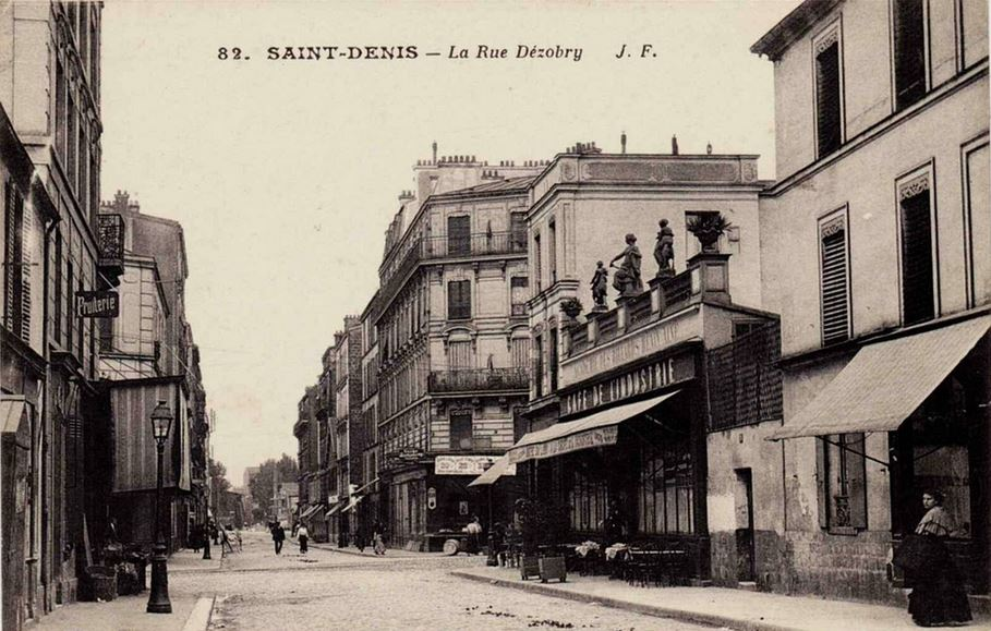 Saint-Denis.Rue Dezobry.Café de l'Industrie